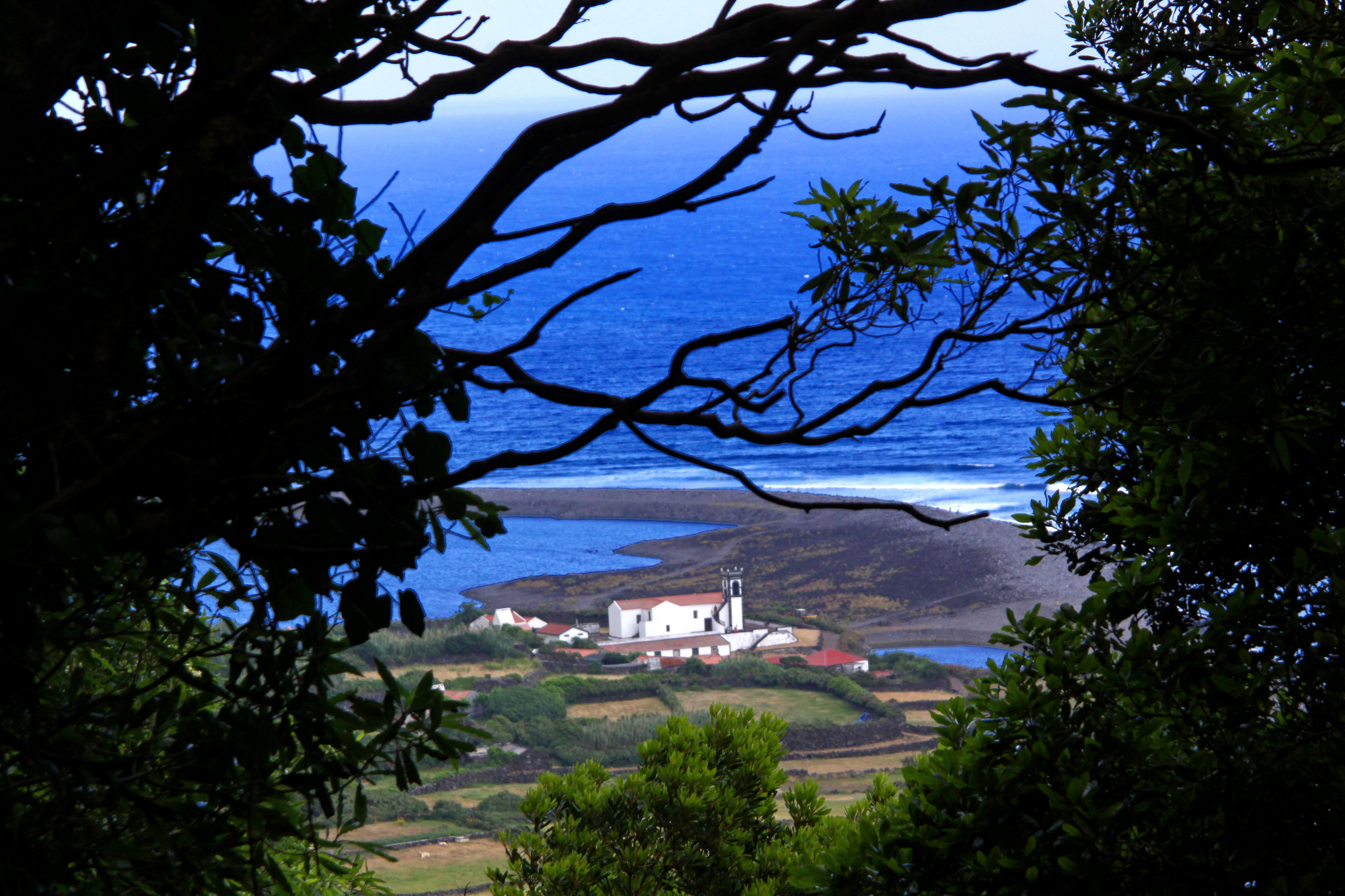 Ilha de São Jorge, Açores. Vue sur la fajã da Caldeira de Santo Cristo.